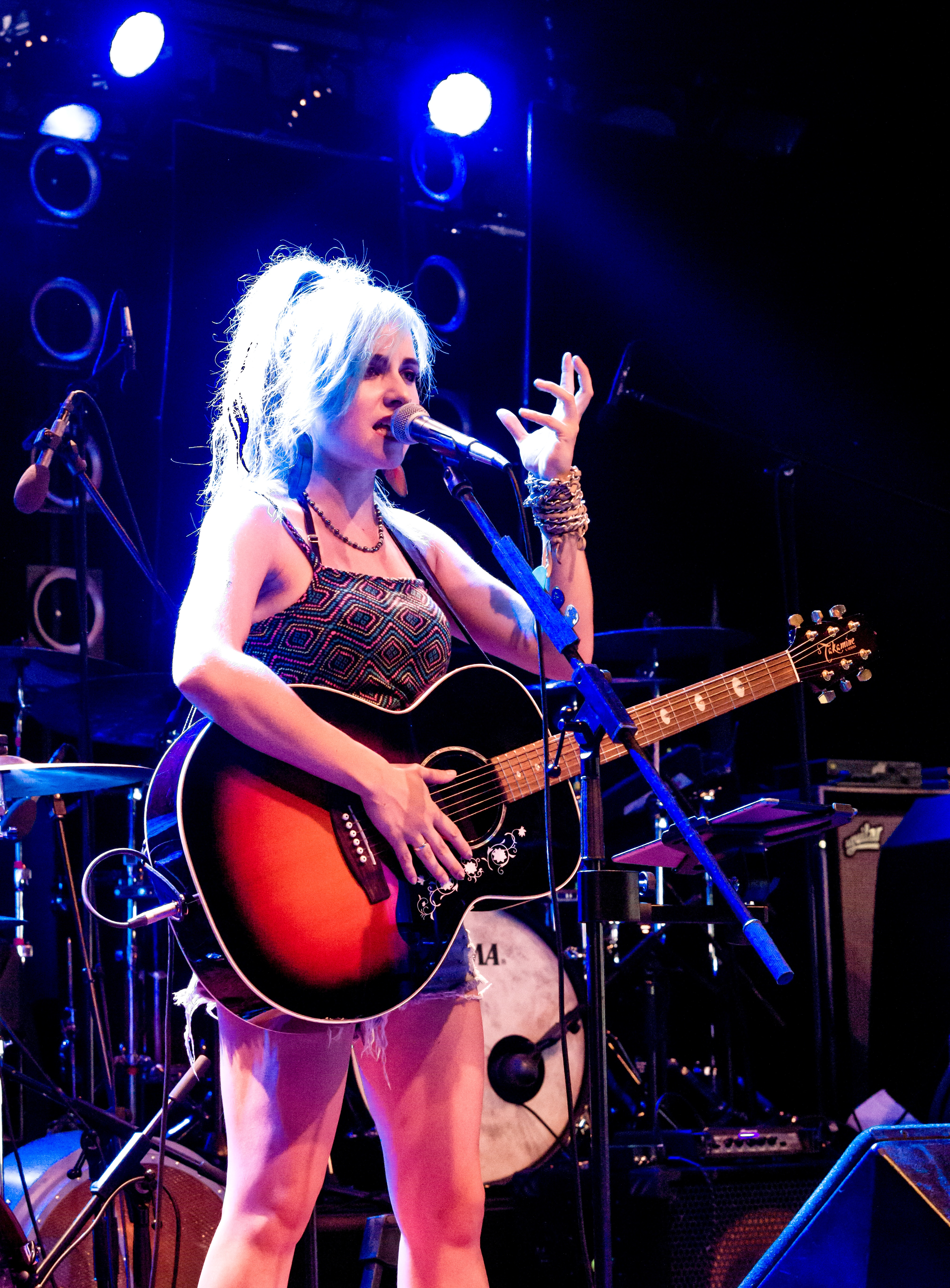 Bilder vom Zelt Musik Festival 2018 in Freiburg im Breisgau Auftritt Charly Klauser am 30. Juli 2018 im Zirkuszelt